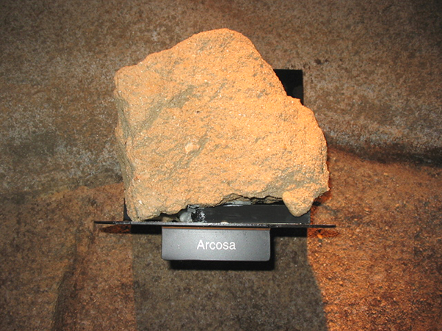 Fotografía digital realizada por Pablo Alberto Salguero Quiles